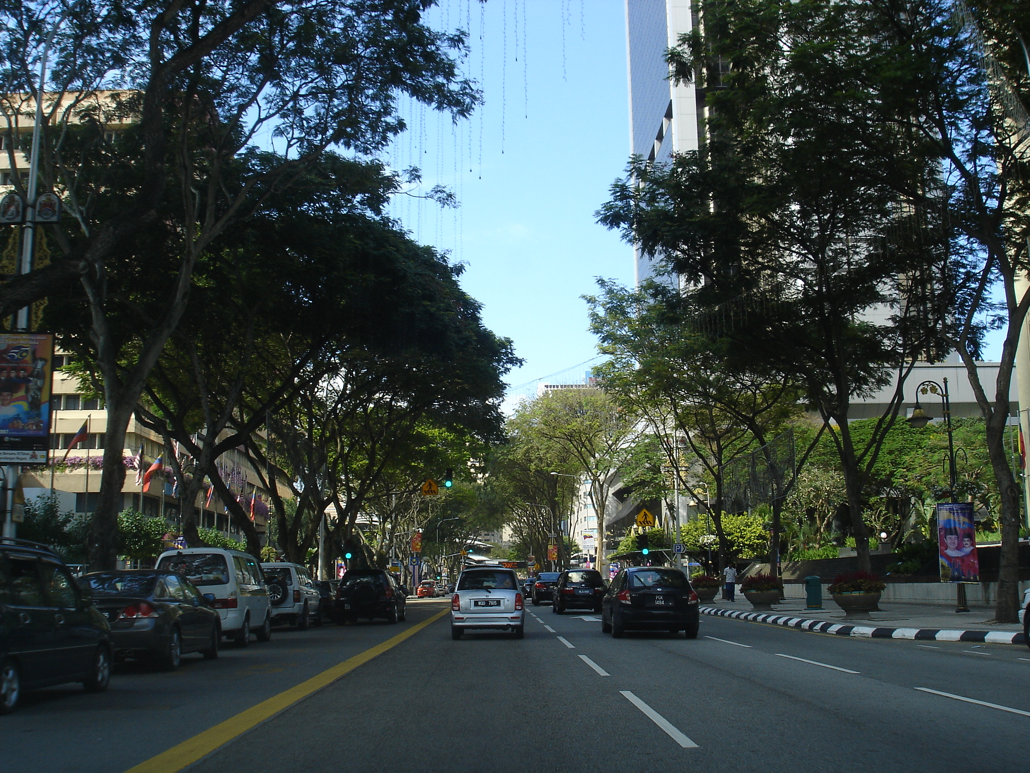 Jalan Raja Laut in Kuala Lumpur.